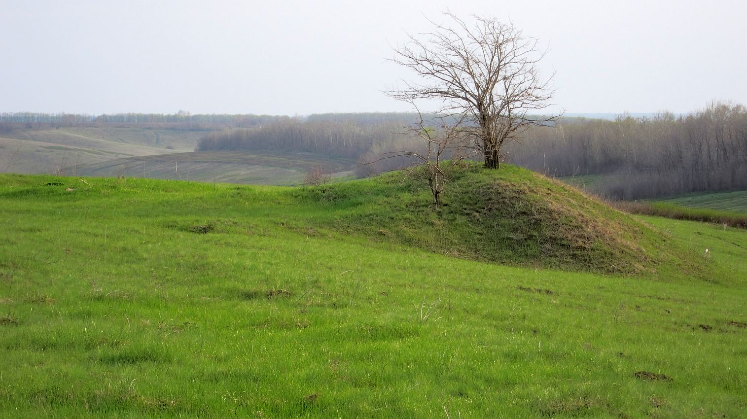 Кургани, Шебелинка, 5 курганів, розташовані на захід та південь села